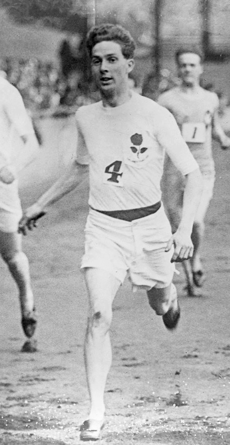 29-7-22, Londres, match [d'athlétisme] France-Angleterre, arrivée du 400 m, [Cecil] Griffiths : [photographie de presse] / [Agence Rol]